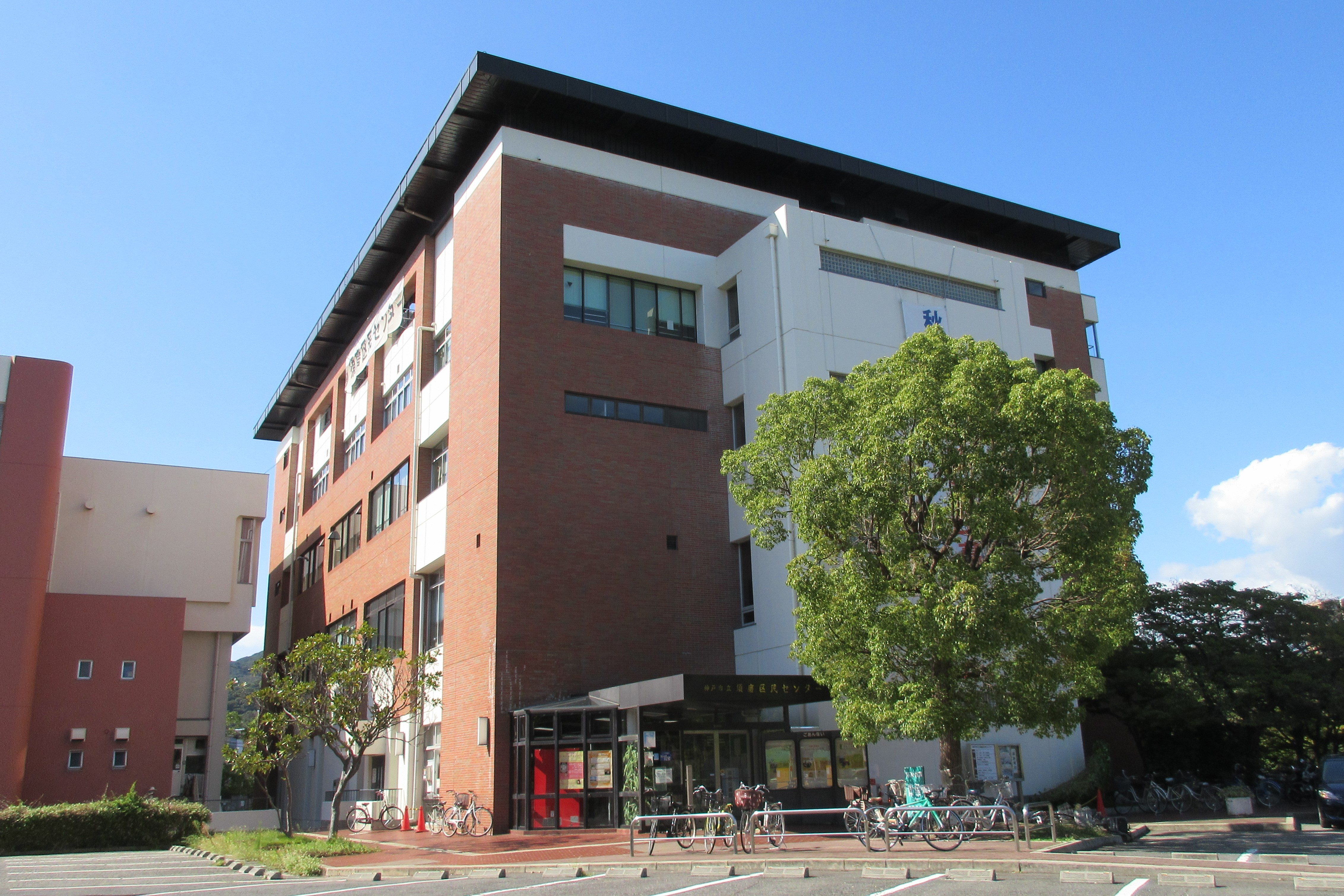 神戸市須磨区民センター